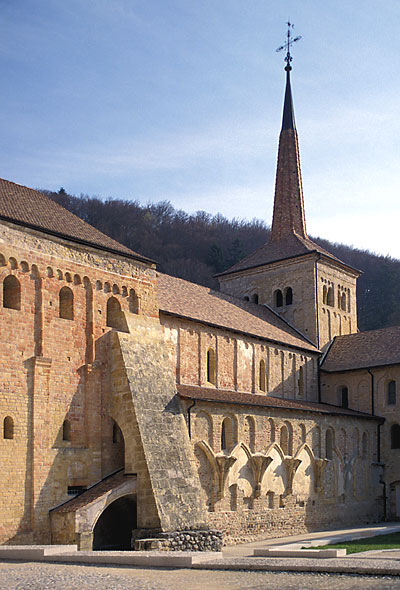 Ehemalige Stiftskirche von Romainmôtier. Überreste des ehemaligen Kreuzgangs sind an der Südmauer noch sichtbar.